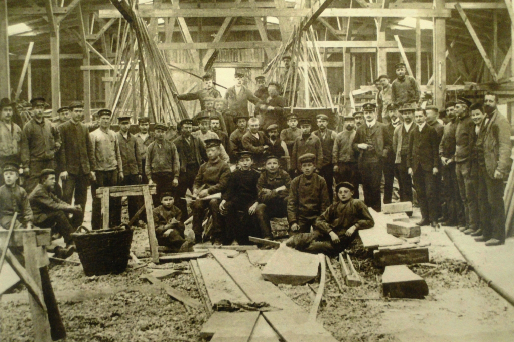 Werkstatt für Boots- und Schiffbau, Haus Elsfleth